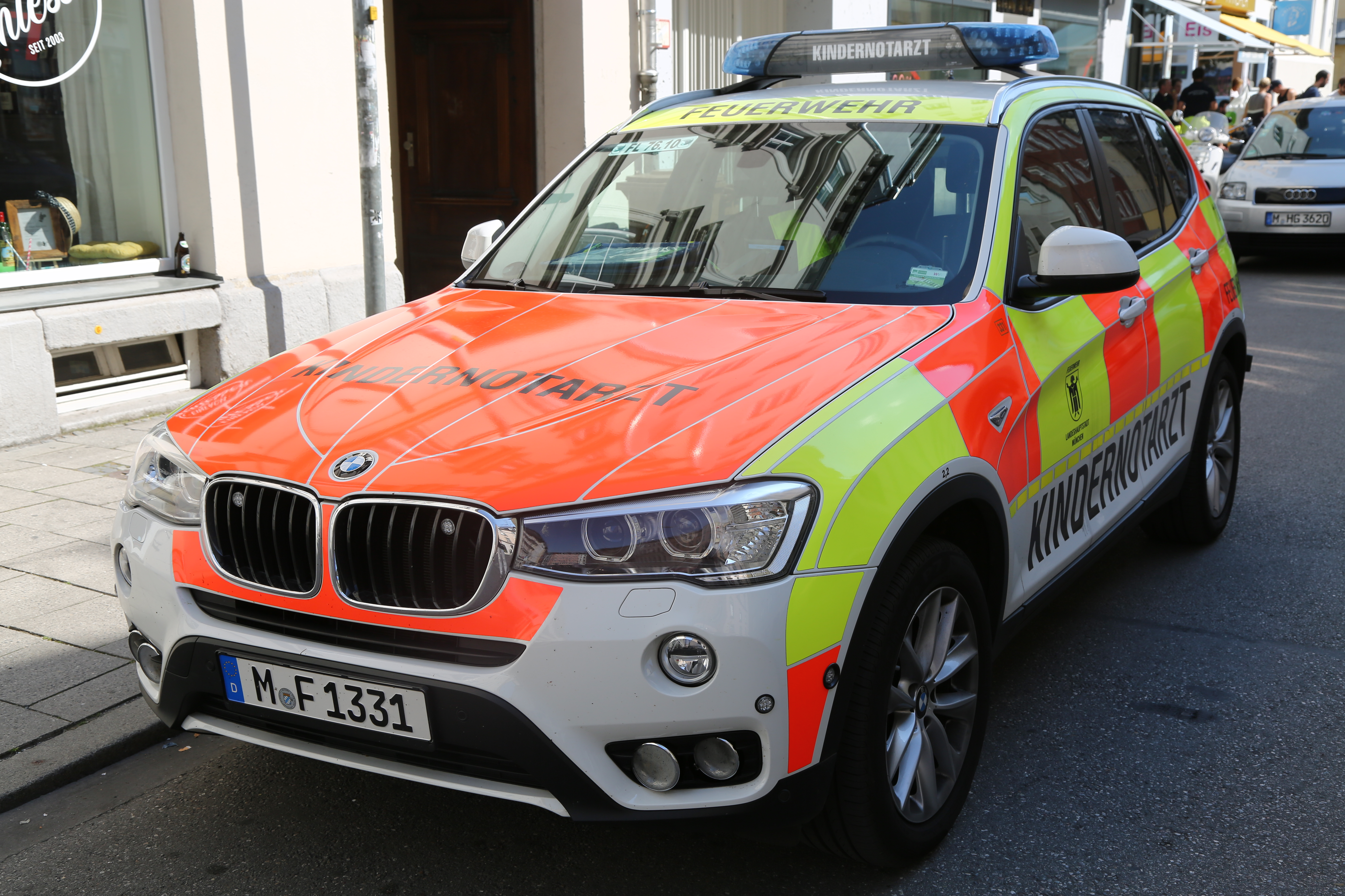 Der aktuelle Kindernotarztwagen der Münchner Berufsfeuerwehr.